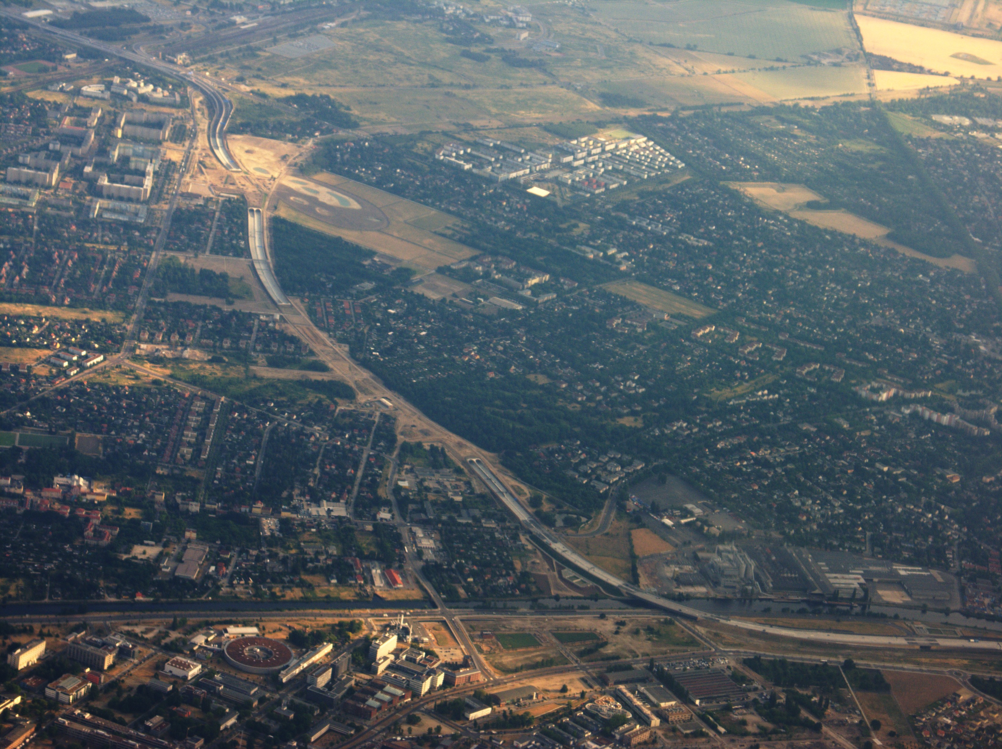 Bundesautobahn 113 zwischen den Anschlusstellen Adlershof (rechts unten) und Schönefeld-Süd (links oben) – auf der Strecke die Teltowkanalbrücke (unten, 149 m lang) und die Tunnel Rudower Höhe (mittig, 950 m lang) und Altglienicke (300 m lang) – aufgenommen aus einem Flugzeug in südliche Richtung